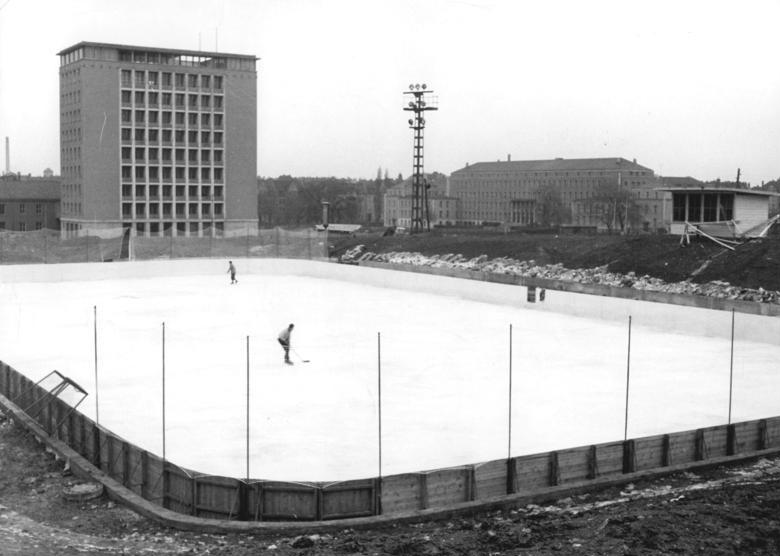 Erfurt, Kunsteisbahn Zentralbild Wittig 26.12.1957 Witt-Qu. Erfurter Kunsteisbahn spielfähig. Im Jahre 1956 wurde mit den Erdarbeiten zum Bau der Erfurter Kunsteisbahn begonnen. Jetzt wurden das Spielfeld mit Rohrsystem und das Maschinenhaus fertiggestellt, so dass der Spielbetrieb aufgenommen werden kann. Nach der Fertigstellung im Jahre 1960 werden Ranganlagen aus Betonfertigteilen und eine Stahlbetontribüne mit Umkleide- und Duschmöglichkeiten für die Sportler sowie ein Reporterturm vorhanden sein. Die Spielfläche der Kunsteisbahn beträgt 30x60 Meter. Mit den Tribünenplätzen werden ausserdem 1 198 Sitz- und 7.000 Stehplätze für die Zuschauer vorhanden sein. Ein 22 km langes Rohrnetz sorgt für einen Umlauf der Kühlflüssigkeit. UBz: Blick auf die Kunsteisbahn im derzeitigen Zustand.